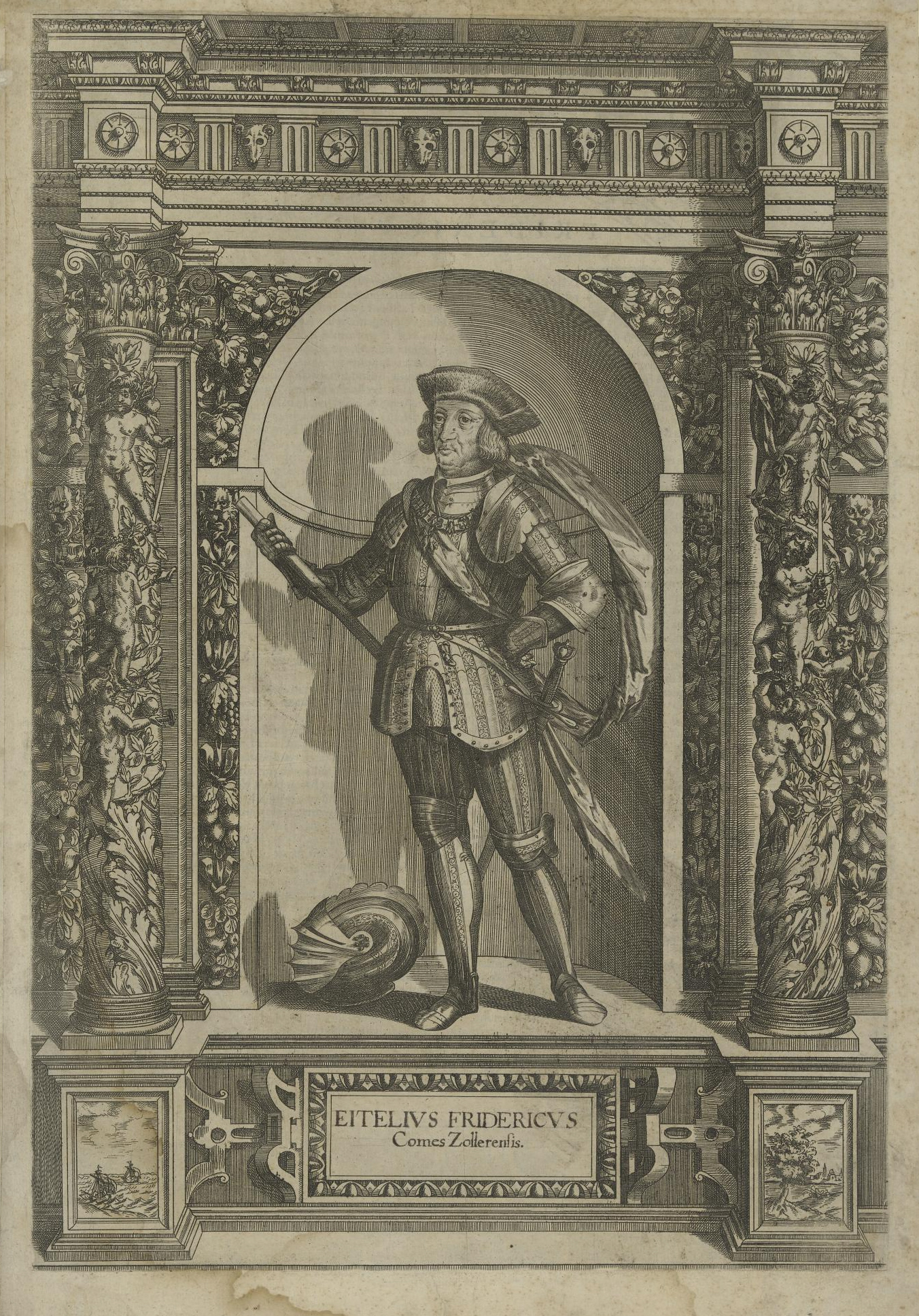 Bildnis des Eitelivs Fridericvs Comes Zollerensis Eitelfriedrich I. von Hohenzollern-Hechingen (1545-1605) Aus: Armamentarium Heroicum